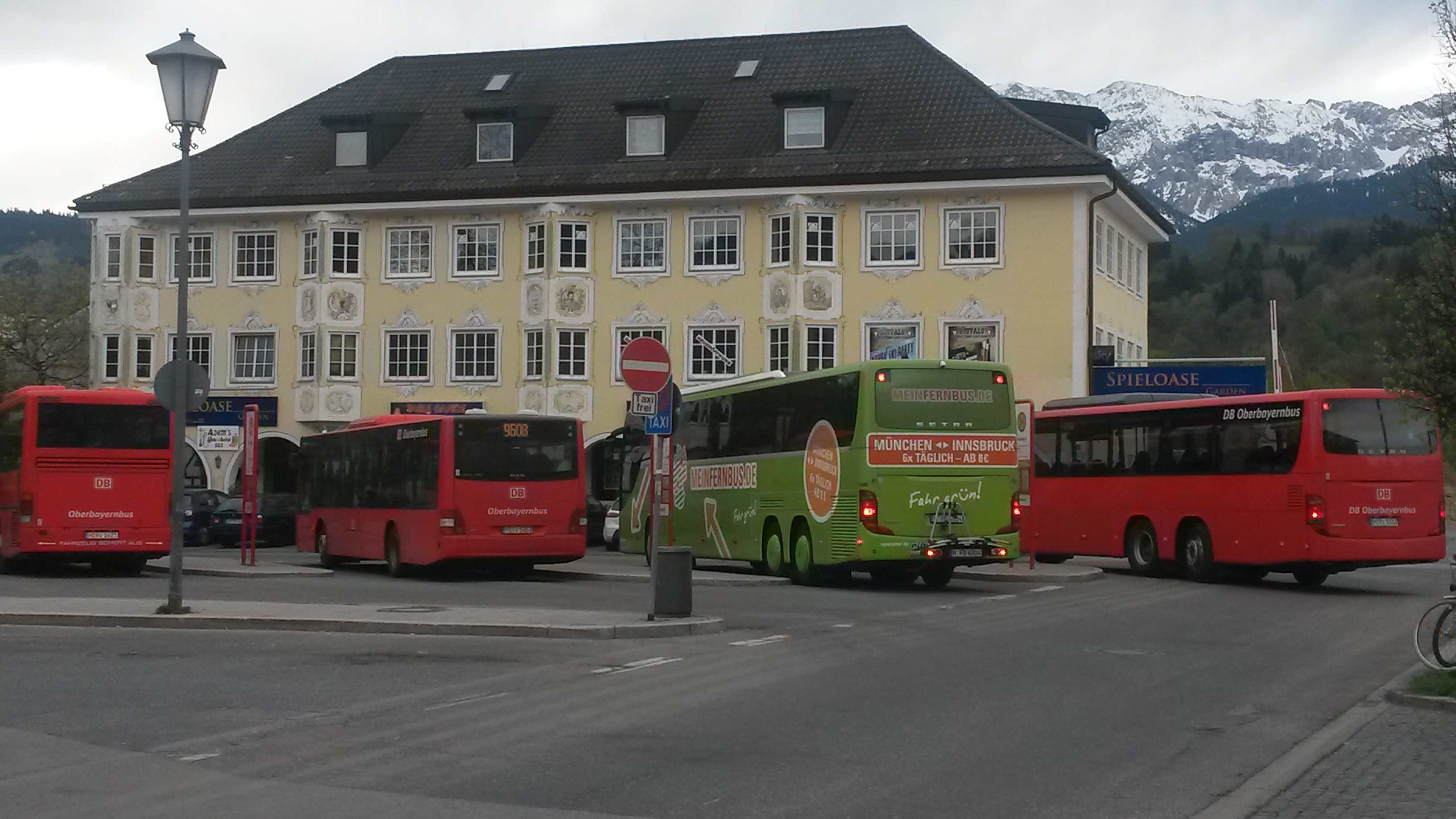 Copyright: Oberbayernbus